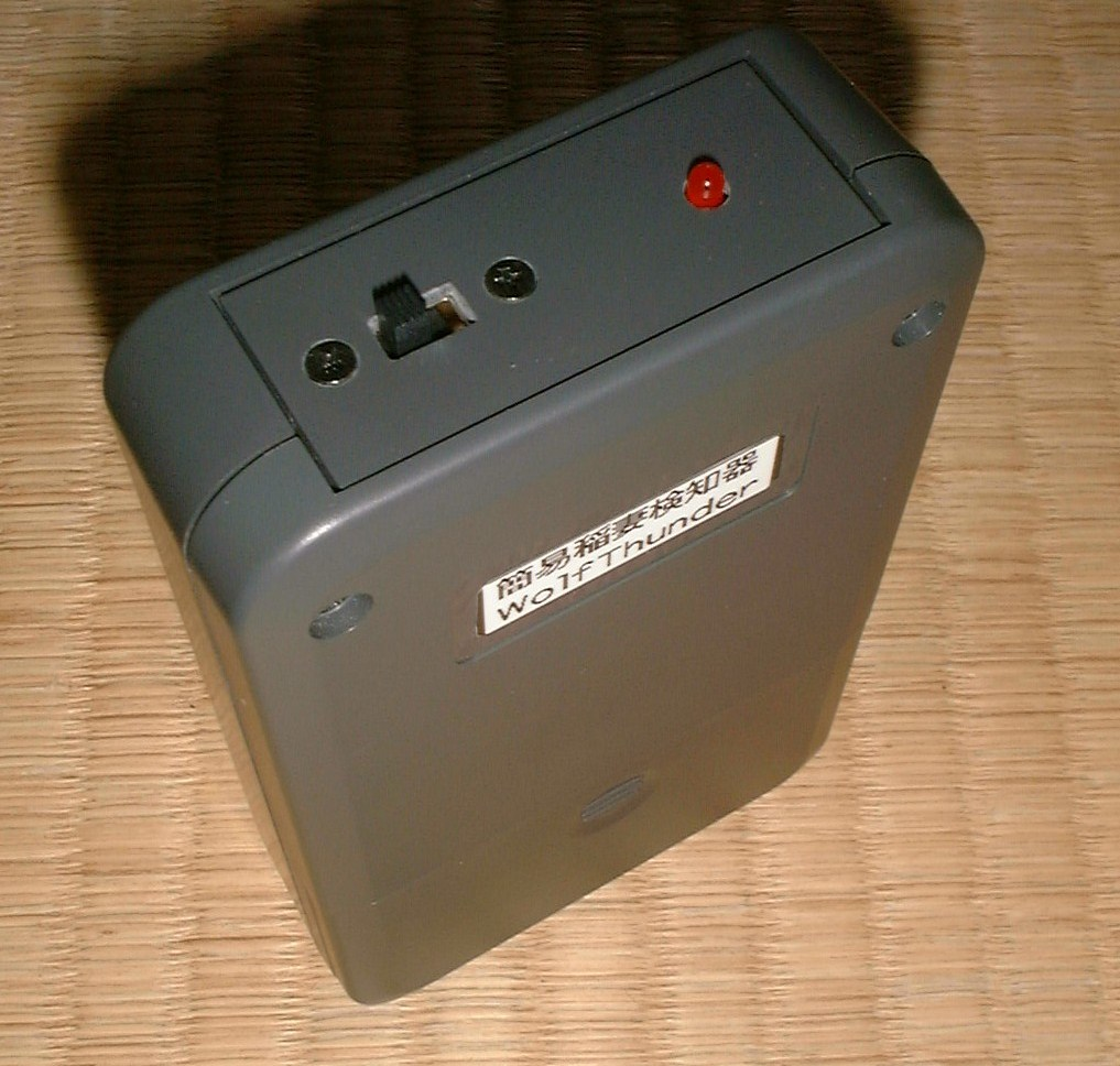 パーソナルユース用日本製簡易型稲妻検知器。